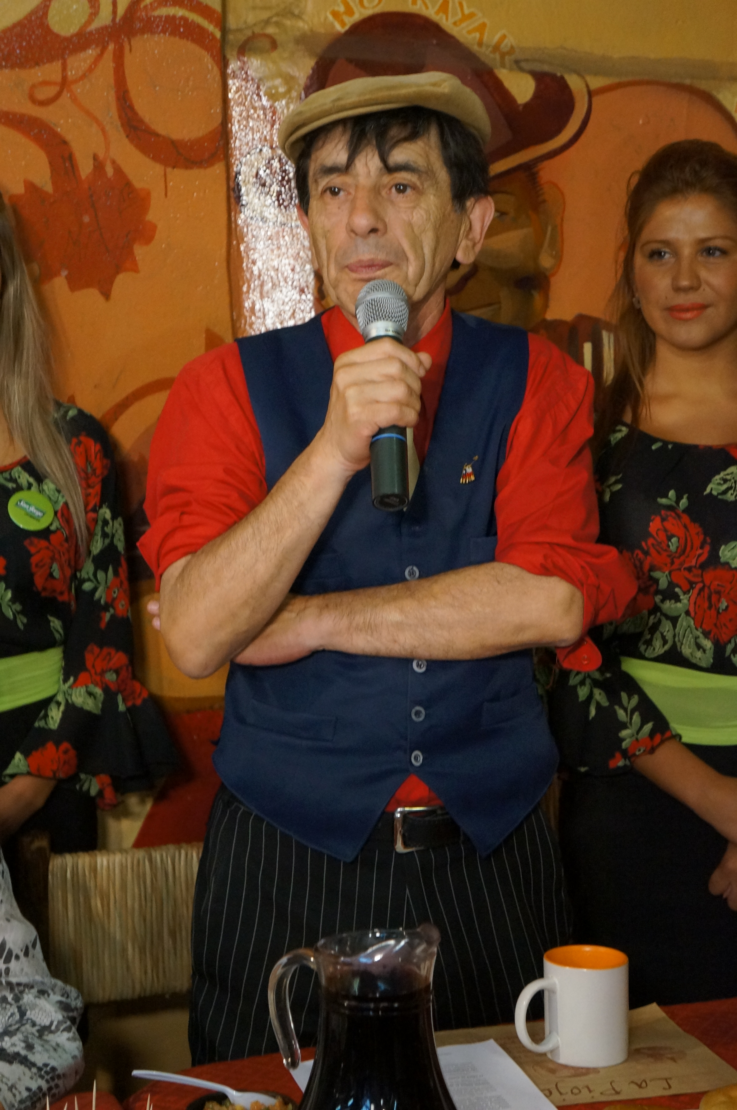 Dioscoro Rojas, en el lanzamiento de la "Cumbre Guachaca" 2012.